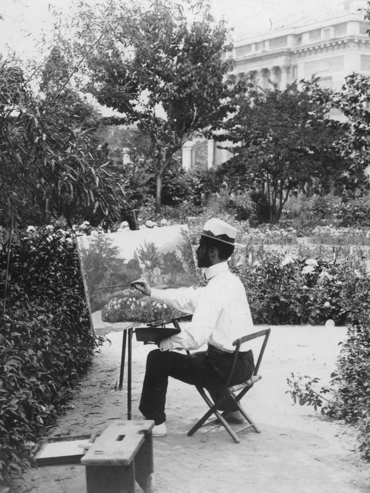 rafael Forns pintando en el Jardín Botánc¡ico de Madrid